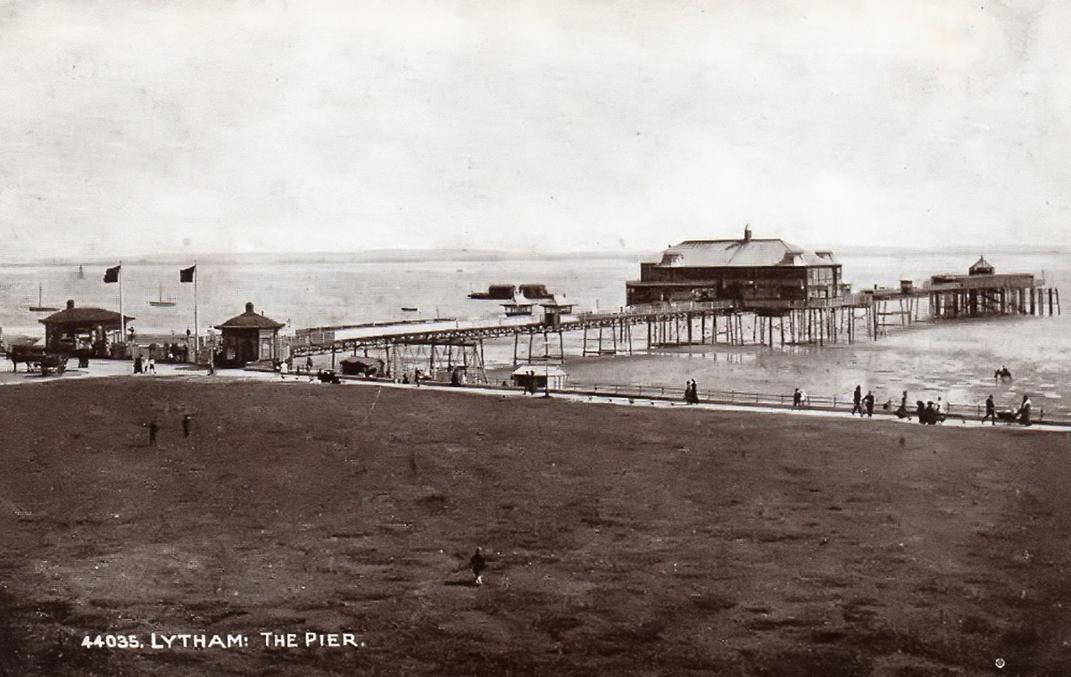 Lytham Pier, c1920